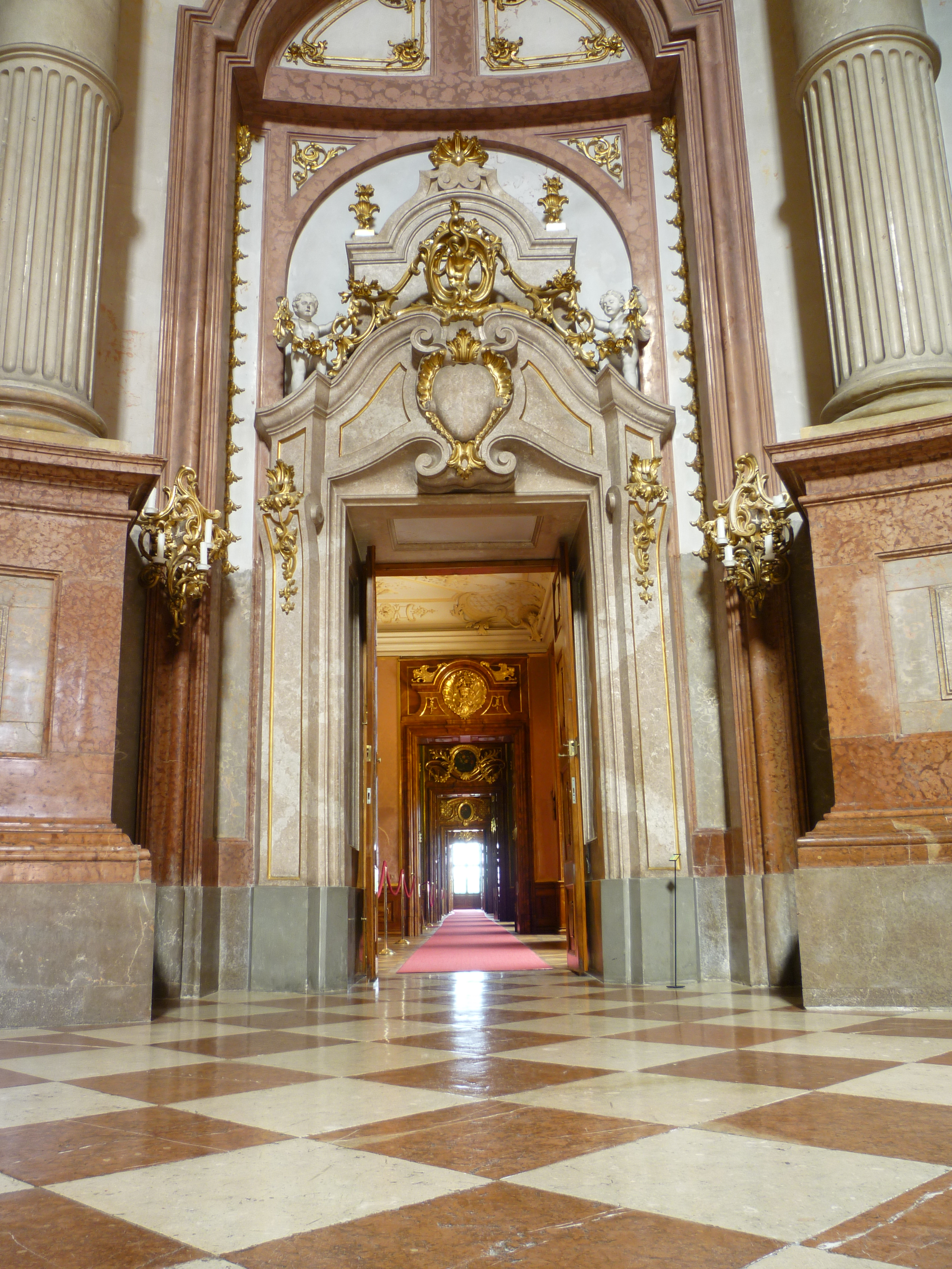 Blick vom Marmorsaal des Stiftes Klosterneuburg in die Raumfolge (Enfilade) der Kaiserappartments